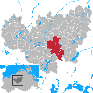 Former Amt Lalendorf in Mecklenburg-Vorpommern - District Güstrow